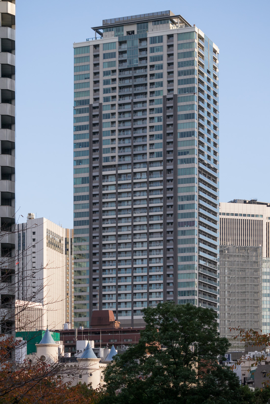 赤坂タワーレジデンス、東京都港区赤坂。